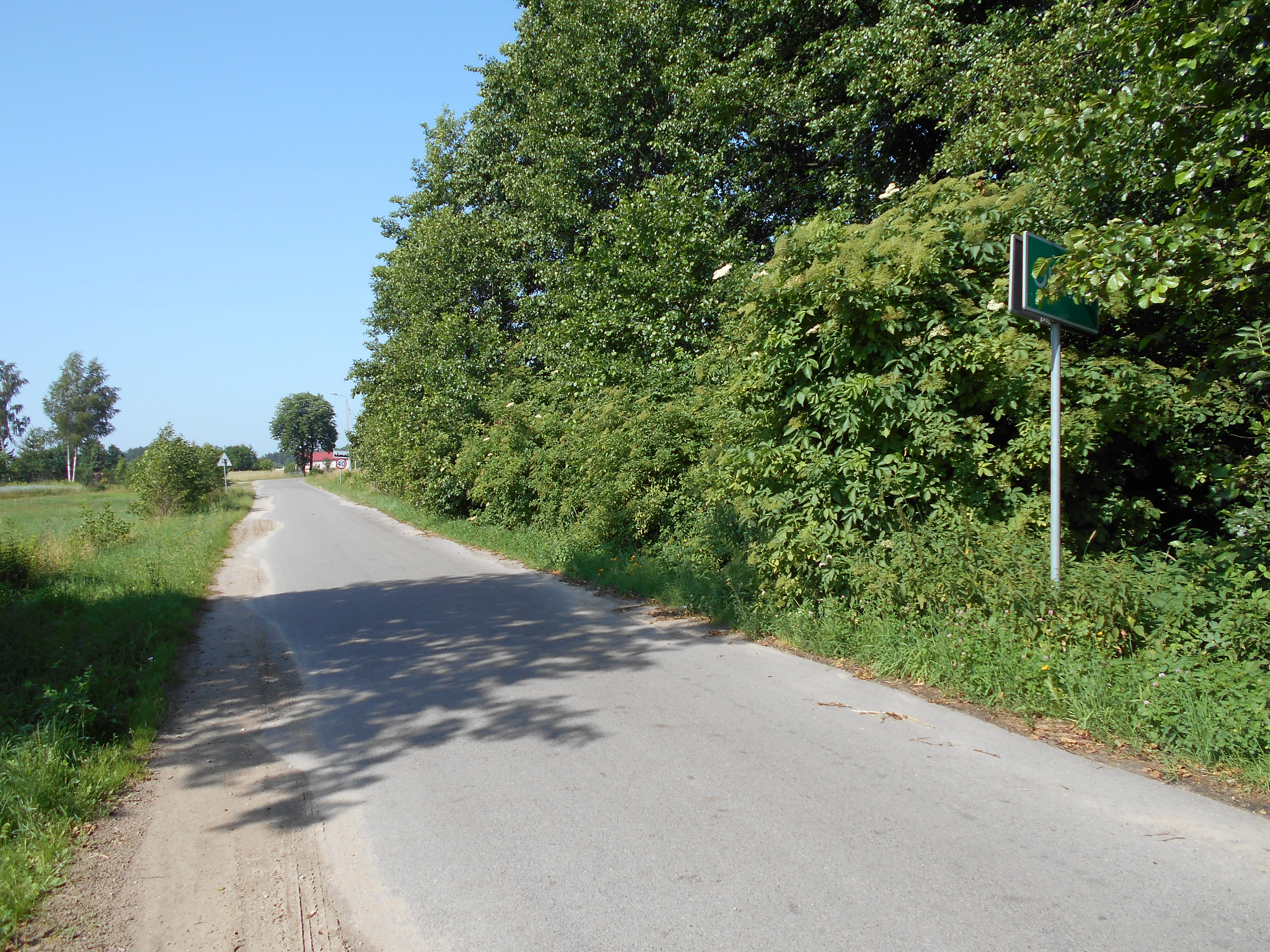 Miejscowość w gminie Kołbiel